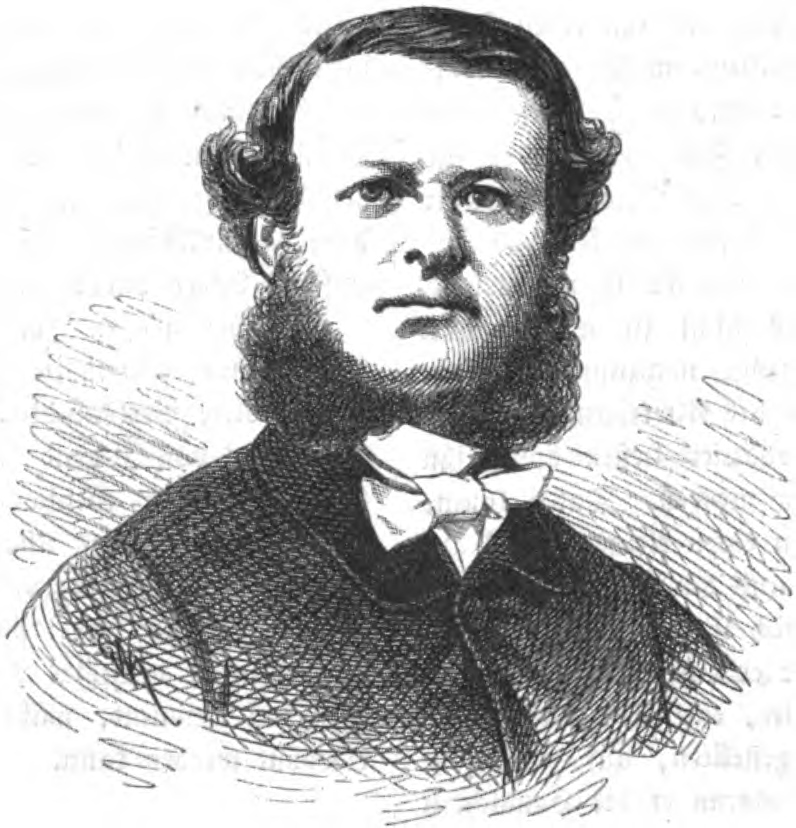 Carlo Pellion di Persano, italienischer Admiral und Marineminister.